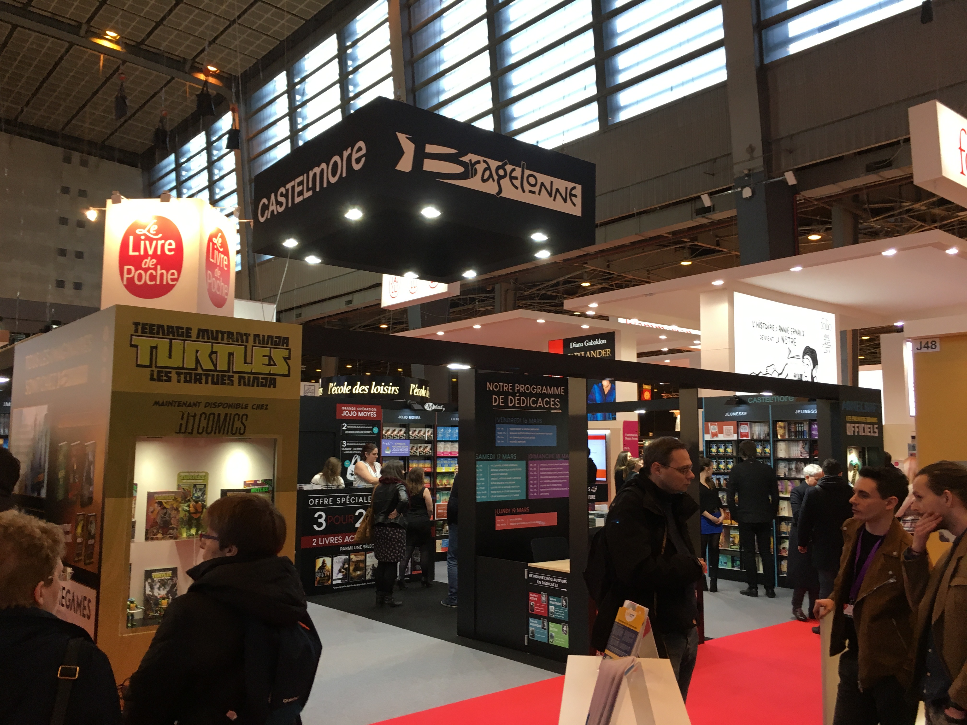 Stand